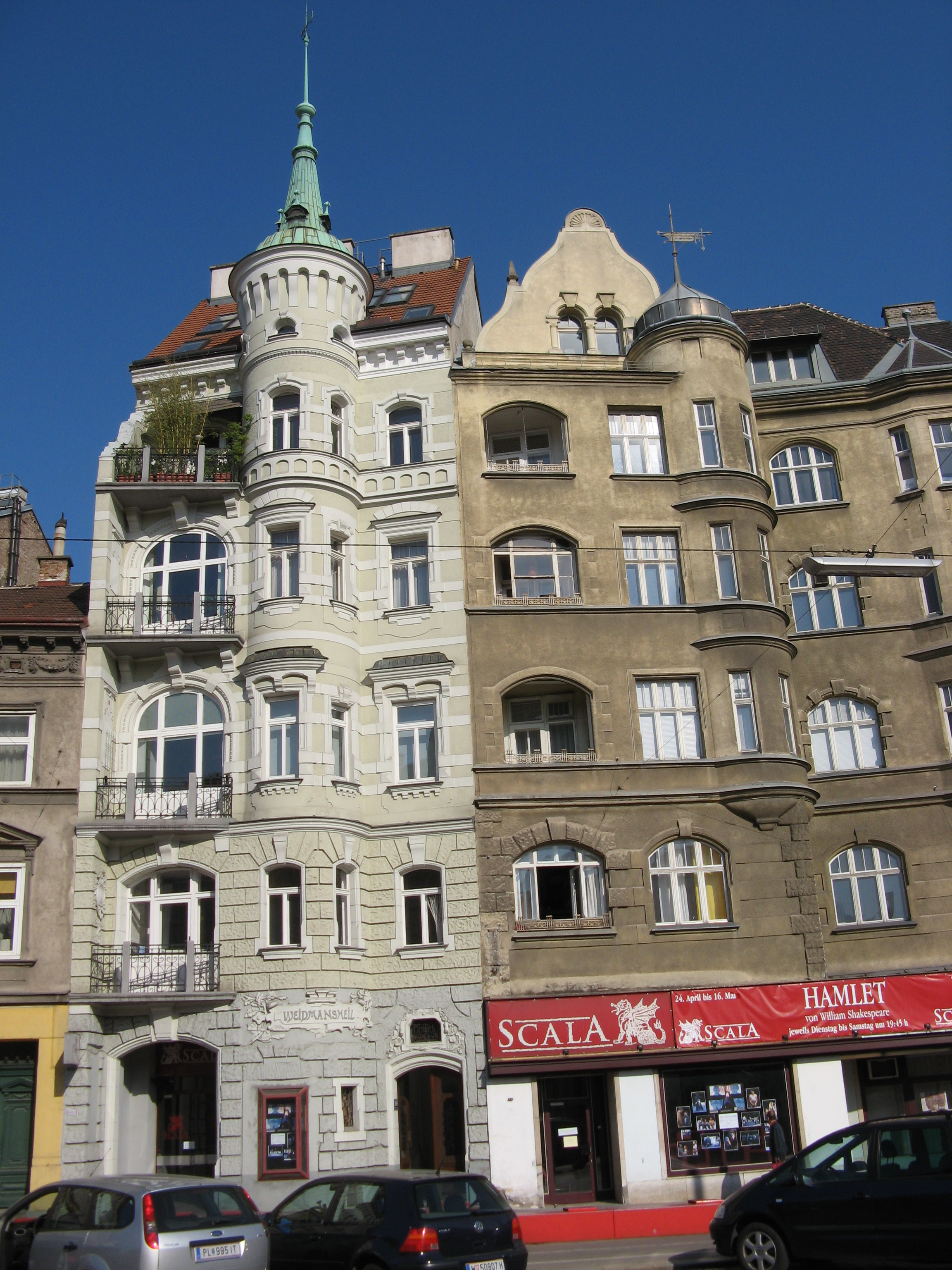 Haus (1910/11) von Eugen Felgel von Farnholz und Friedrich Kleibl, Wiedner Hauptstraße 106-108, Wien-Margareten